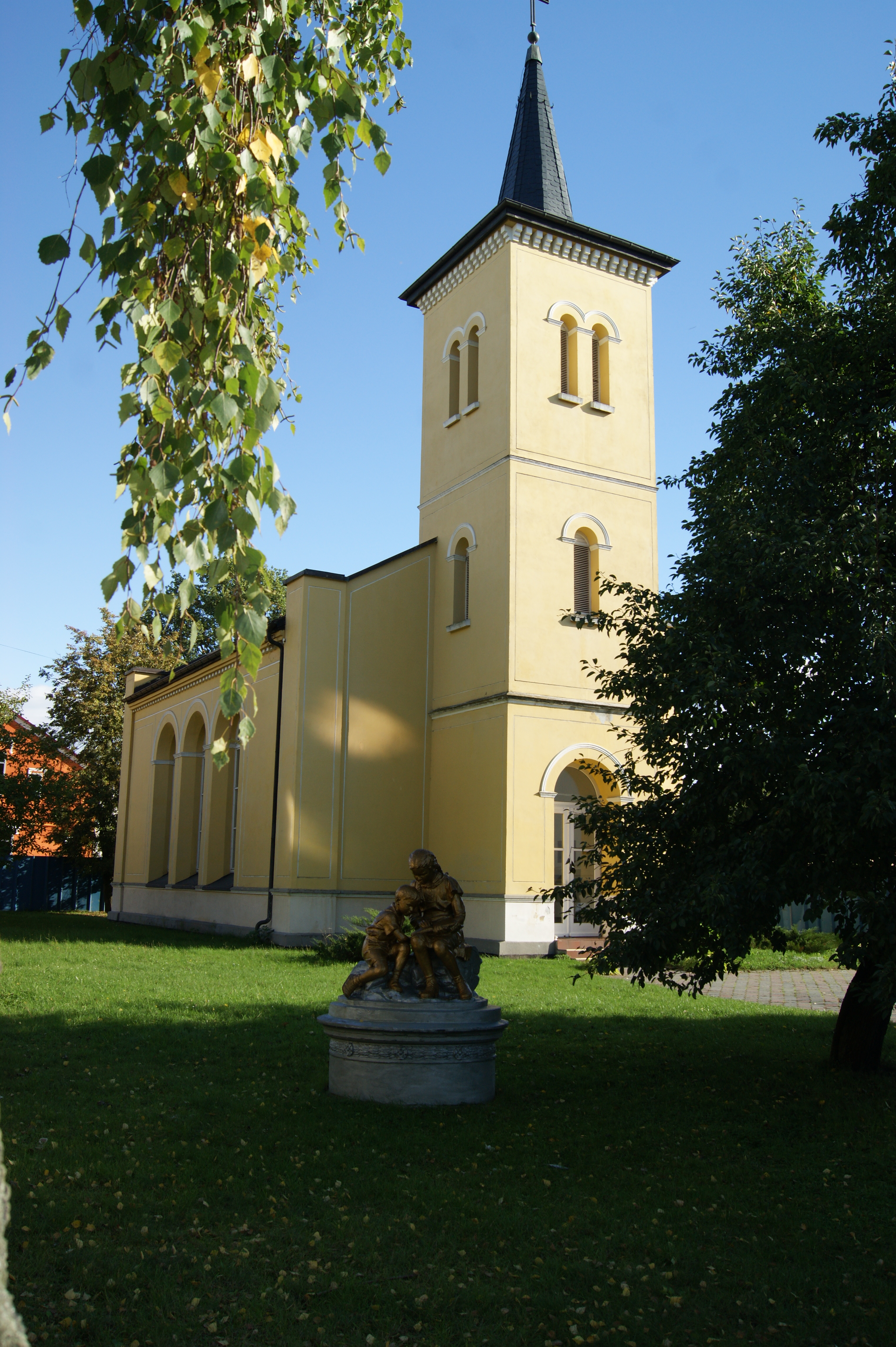 Кирха «зальцбургская» (Калиниградская область, Гусев, город гусев, менделеева улица)